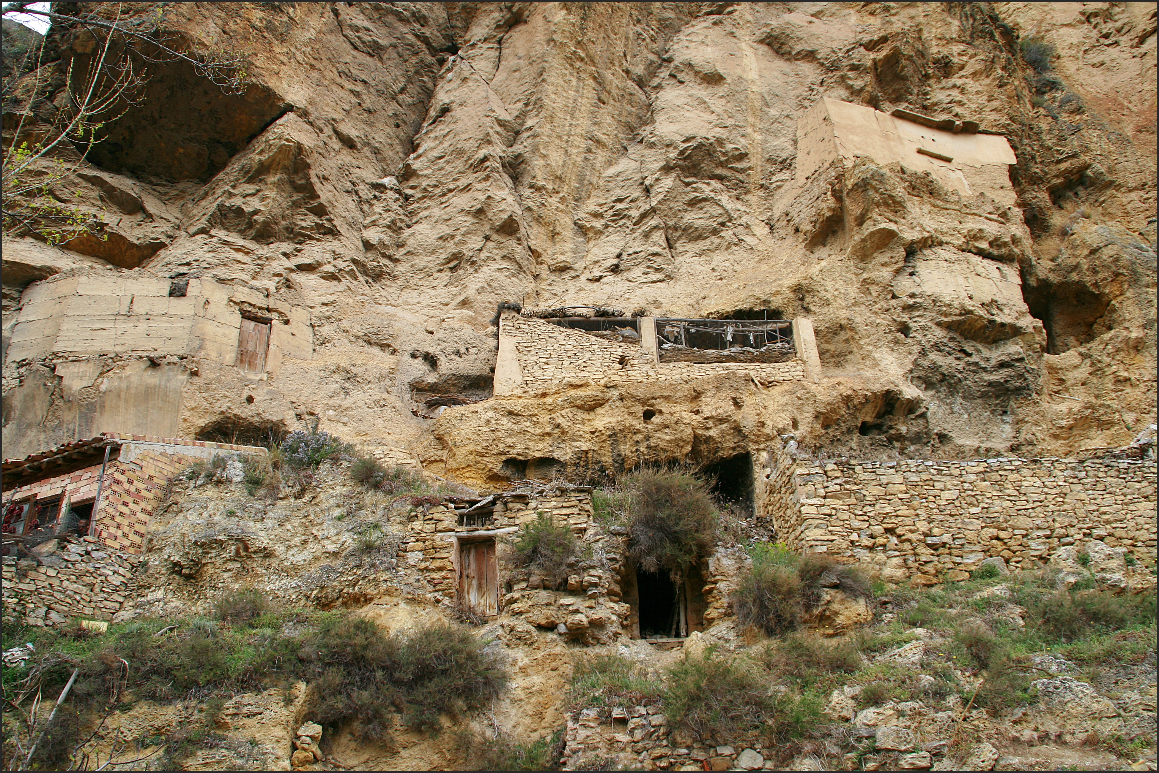 viviendas rupestres . Algunas conservan sus bóvedas, aunque la mayoría se ha derrumbado. Encima de la Torre Fuerte hay restos del castillo. Las viviendas rupestres y la torre formaban la primitiva 'Finistrellas'.